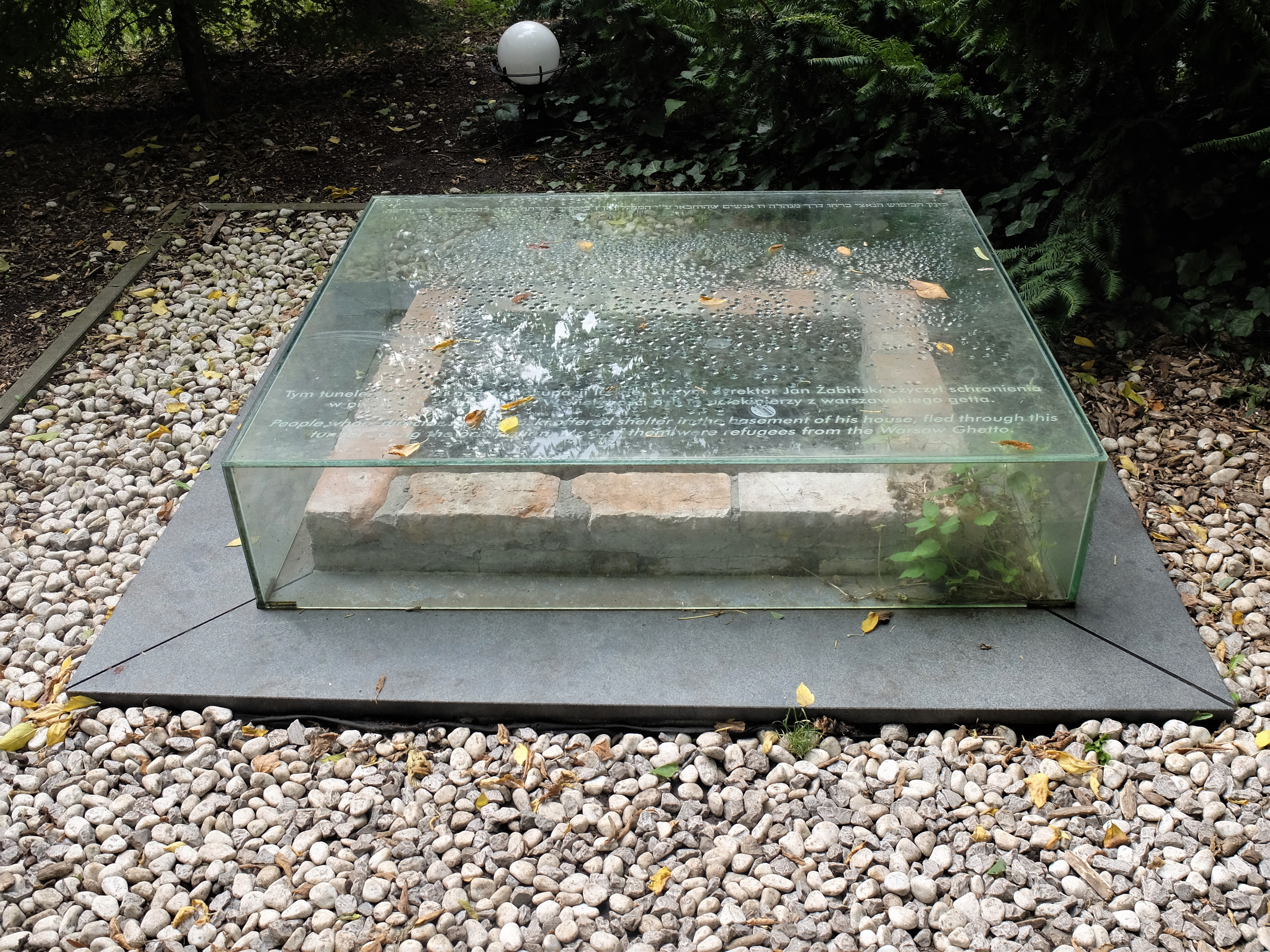 Tunel, którędy wchodzili/wychodzili ukrywający się Żydzi. Teren przy willi rodziny Żabińskich w warszawskim ZOO.